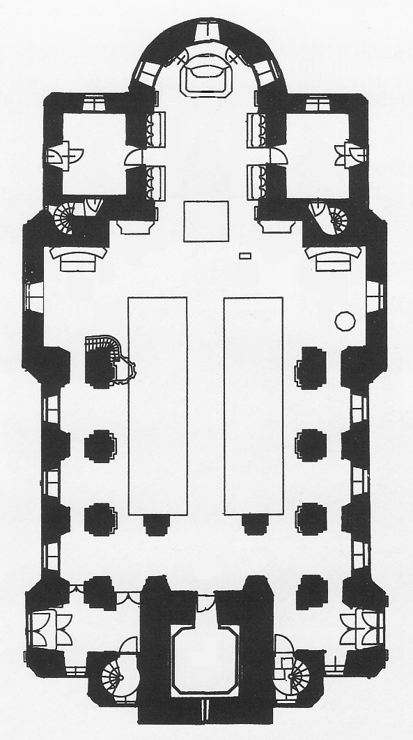 Grundriss der Pfarrkirche von Ravelsbach